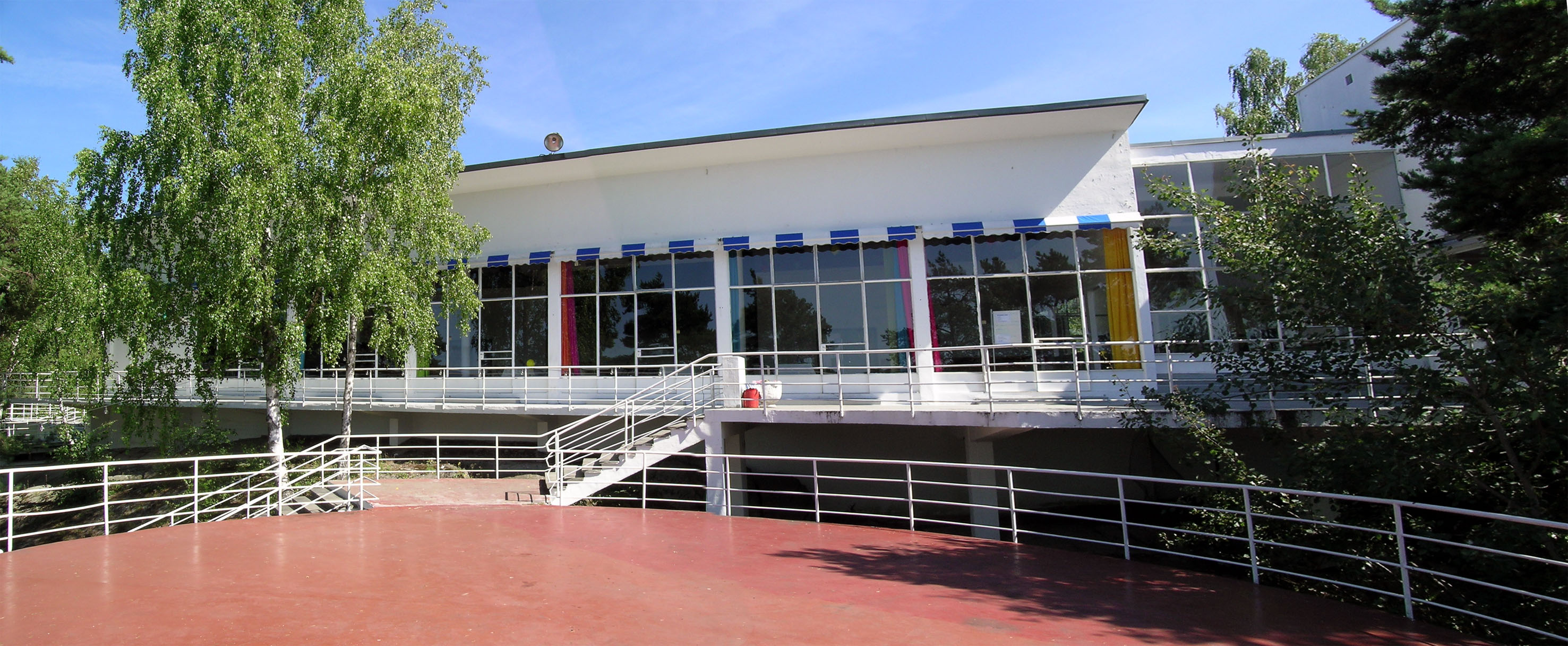 Ingierstrand restaurant, Oppegård, Norway.